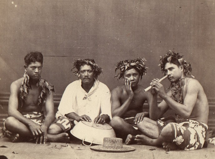 Quatre jeunes Tahitiens assis, dont l'un joue de la flûte nasale (vivo)